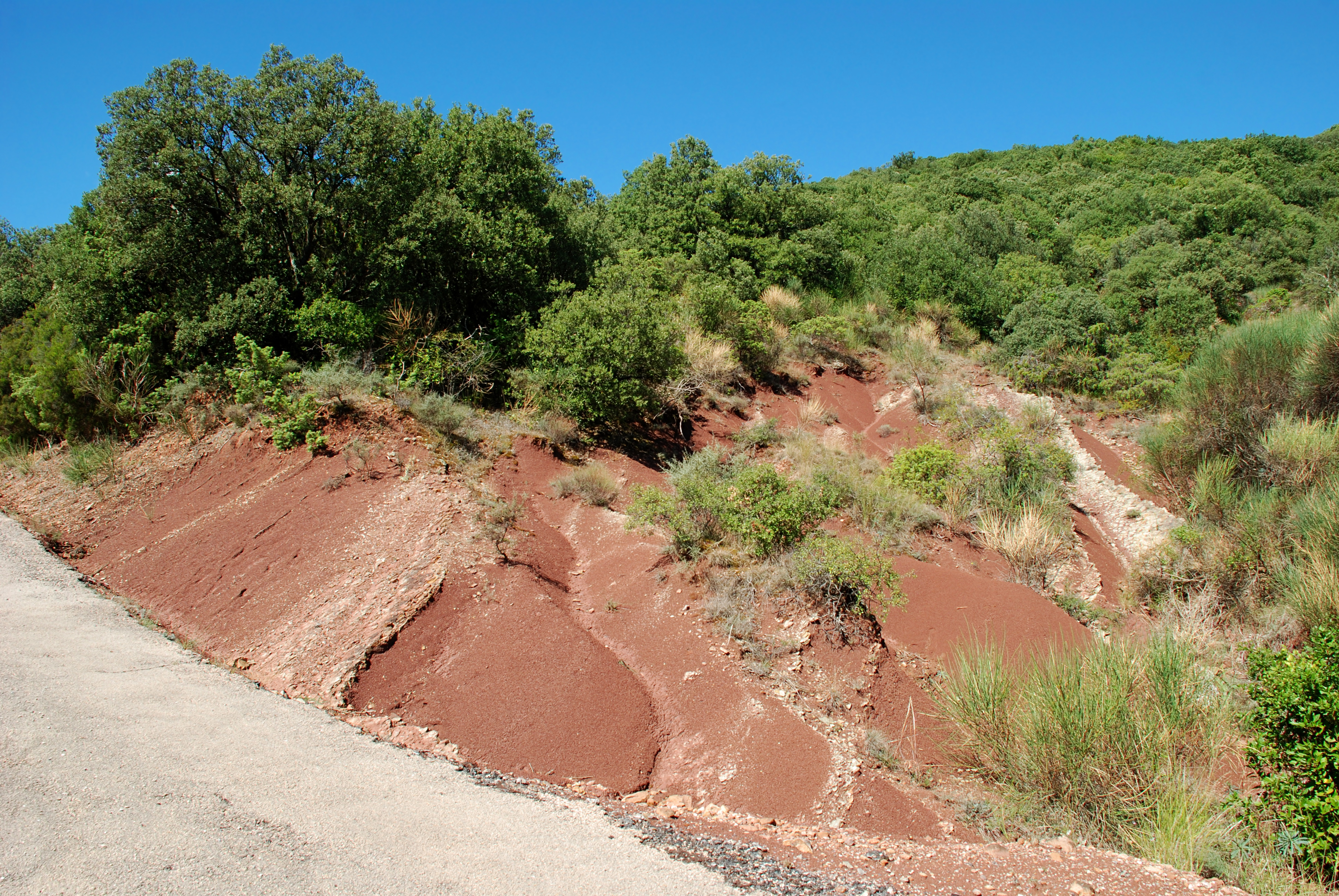 France - Languedoc - Hérault - La Tour-sur-Orb - Saint-Xist - Terres rouges à proximité de l'église Saint-Cyr et Sainte-Julite